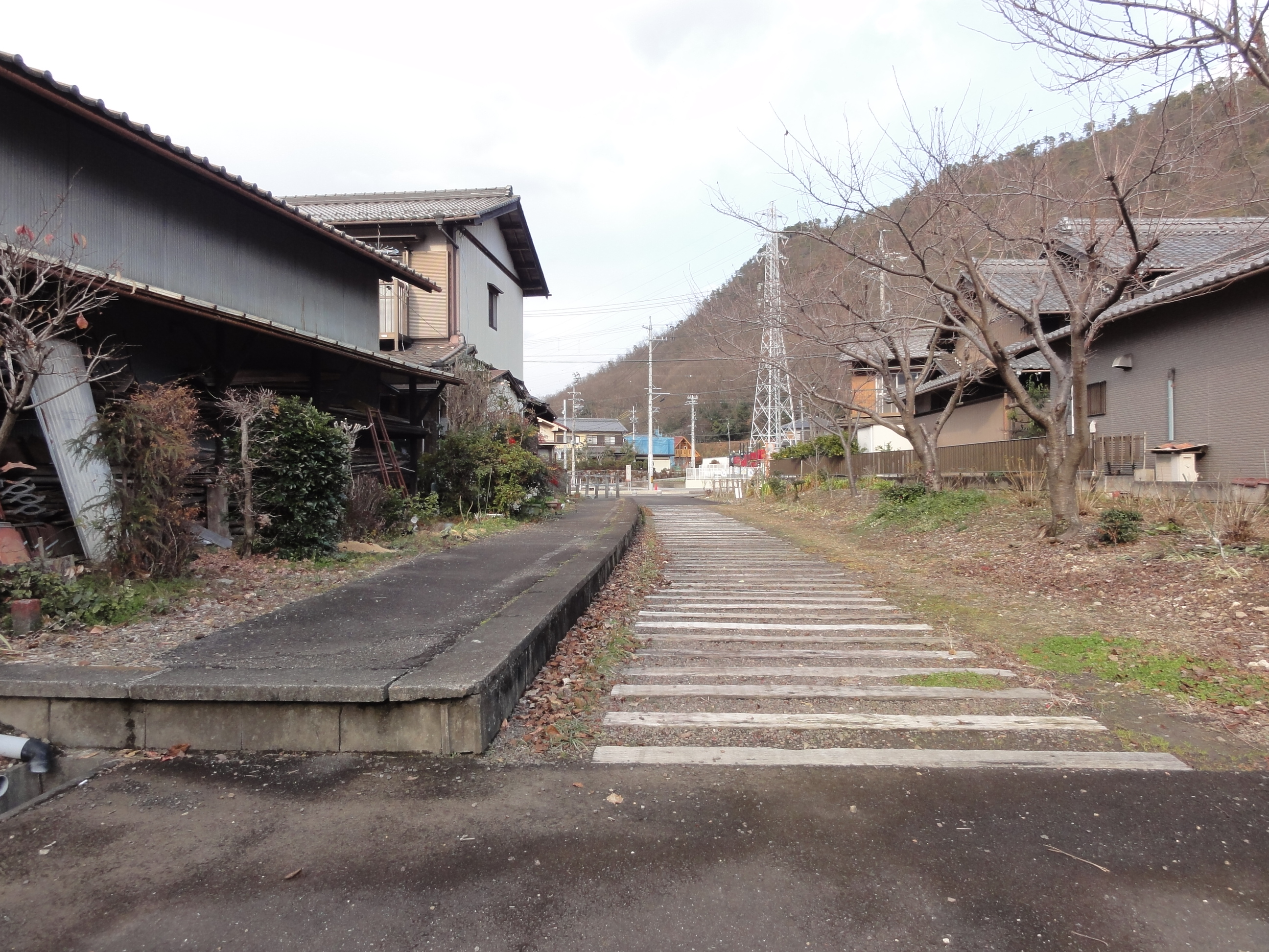 松森駅 (名鉄) 跡地